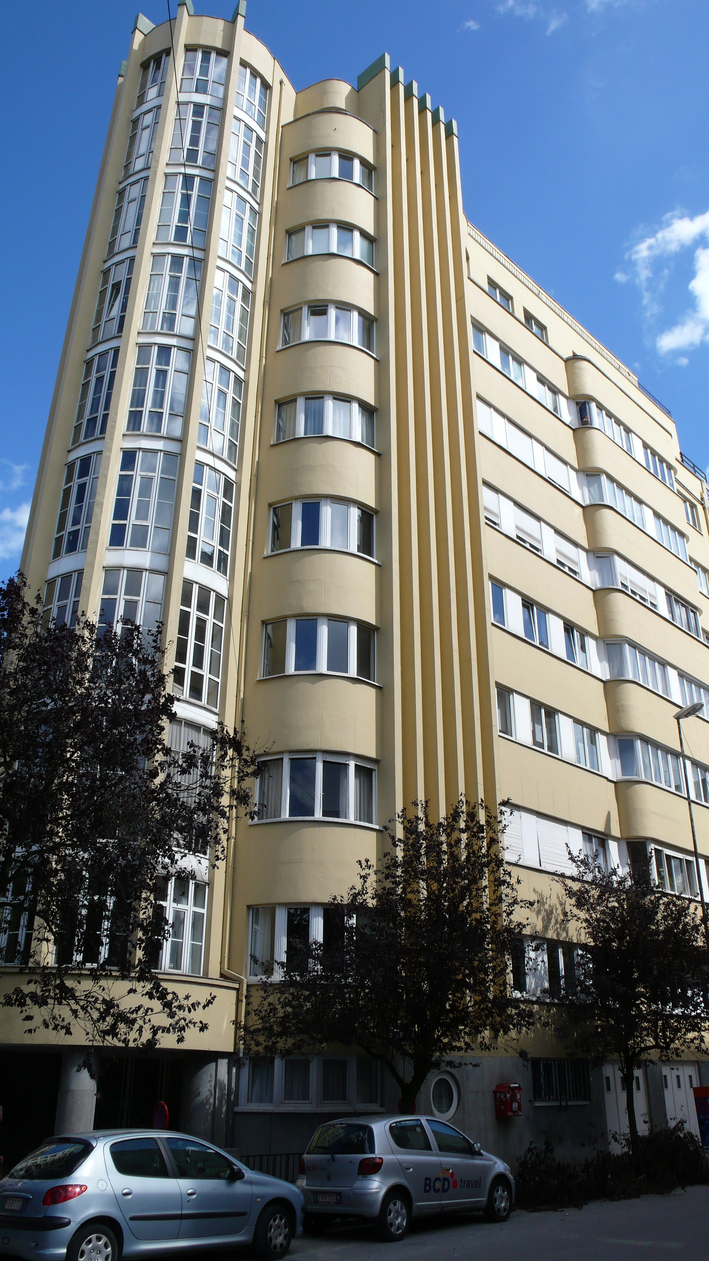 Jean-Florian Collin, Résidence Ernestine (1931), Rond-Point de l'Etoile, Ixelles (1050 Bruxelles